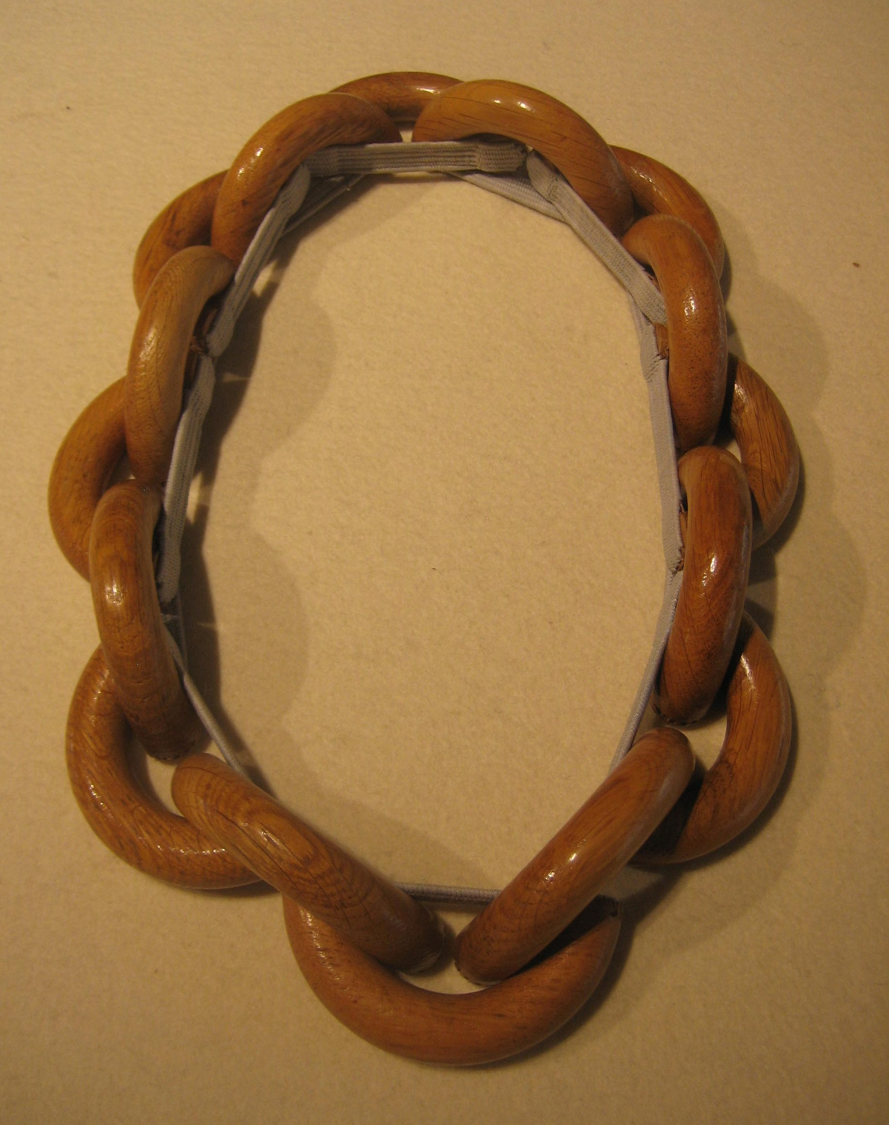 Halssierraad van Barbara Schrobenhauser Vom Tragen und Halten III, halssieraad, 2018